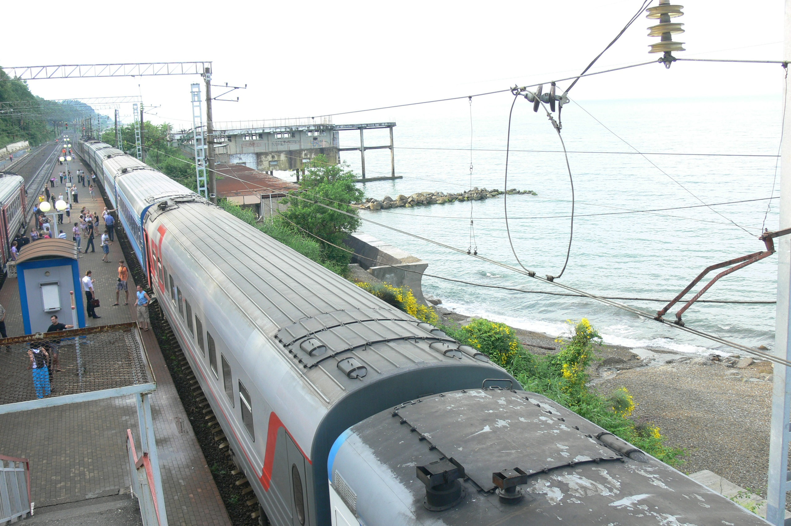 станция Якорная щель